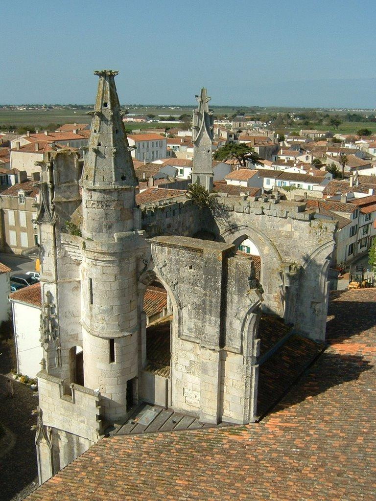 Saint Martin de Ré (Ile de Ré, Charente-Maritime, France) : église Saint Martin : vestiges du croisillon sud du transept vus depuis le clocher.